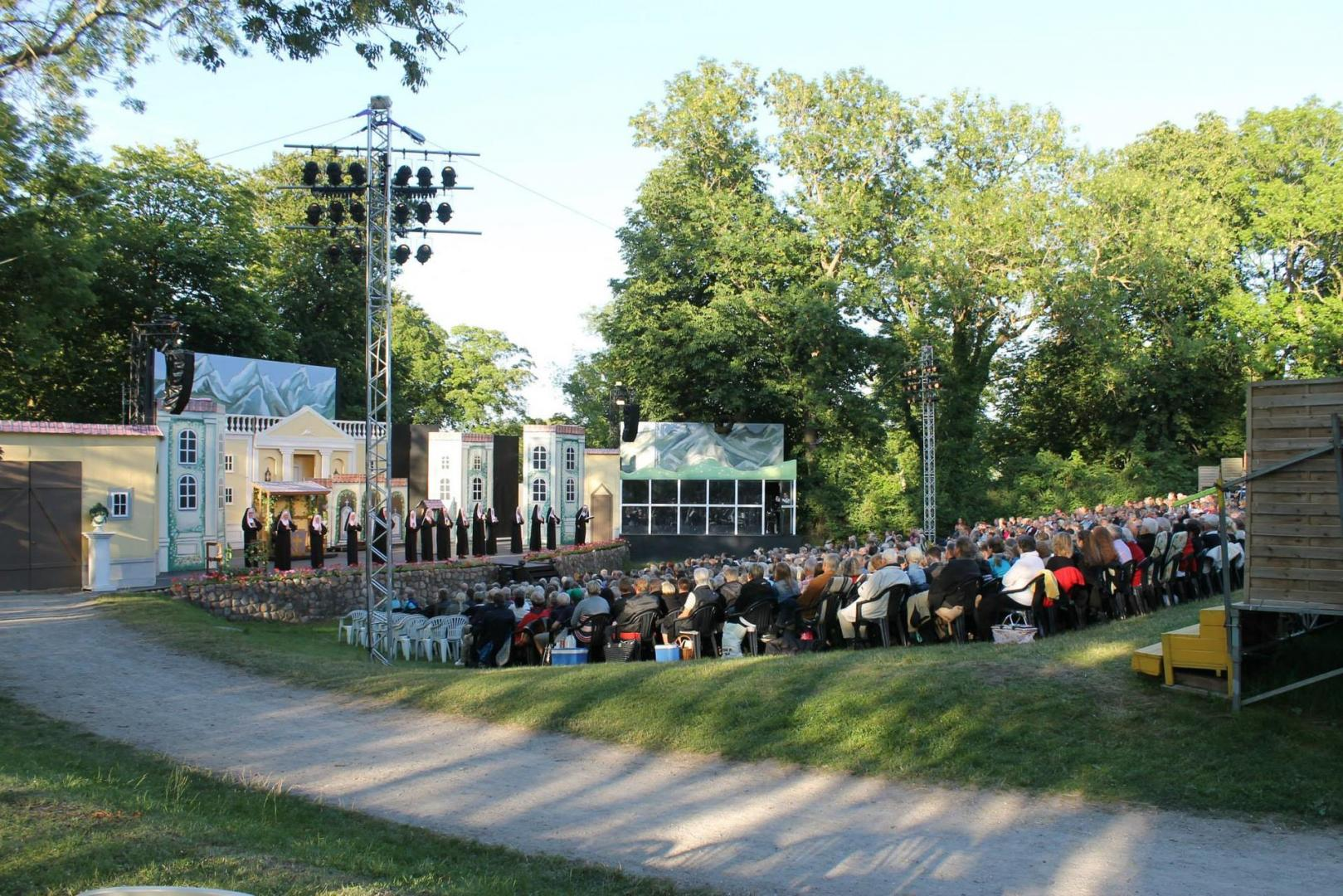 Udsigt over scenen og voldspilspladsen til premieren på The Sound of Music i juli 2015